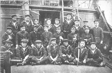 第三回旅順閉塞隊相模丸乗員